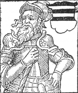 Dvojportrét Viktorína a Hynka z Poděbrad